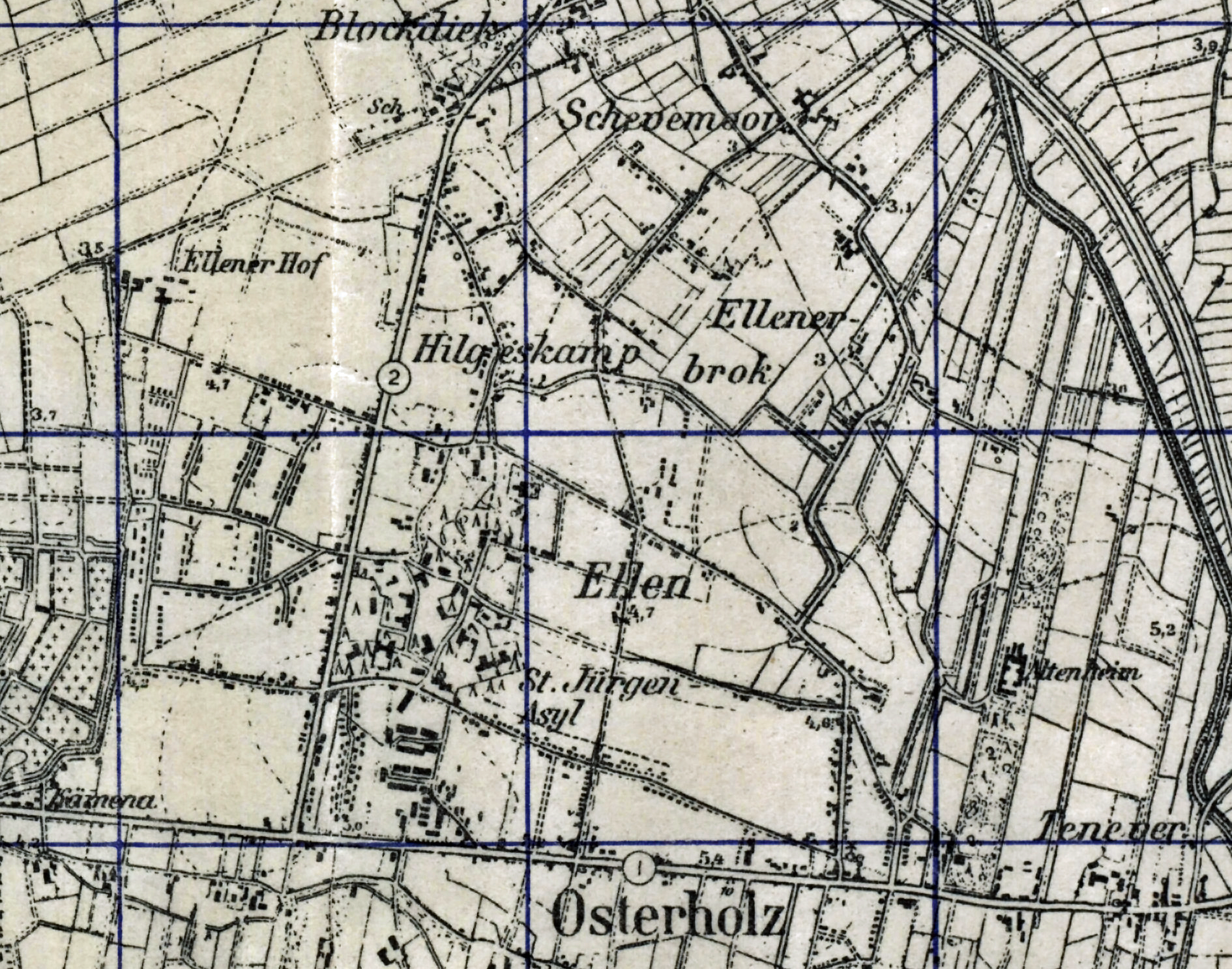 St.-Jürgen-Asyl Ein Satz von topographischen Karten vor dem Zweiten Weltkrieg Deutschland, ursprünglich von der deutschen Regierung gedruckt, wurden von den Briten und US-Militärs nach dem Krieg beschlagnahmt. Die meisten dieser Karten sind Nachdrucke der British Geographical Section, dem Generalstab, oder dem U.S. Army Map Service. Das Kartensatz enthält mehrere Editionen aus mehreren Jahren und deckt den größten Teil Deutschland [einschließlich Teile des heutigen Polen] der 1930er Jahre ab, aber einige Karten fehlen.